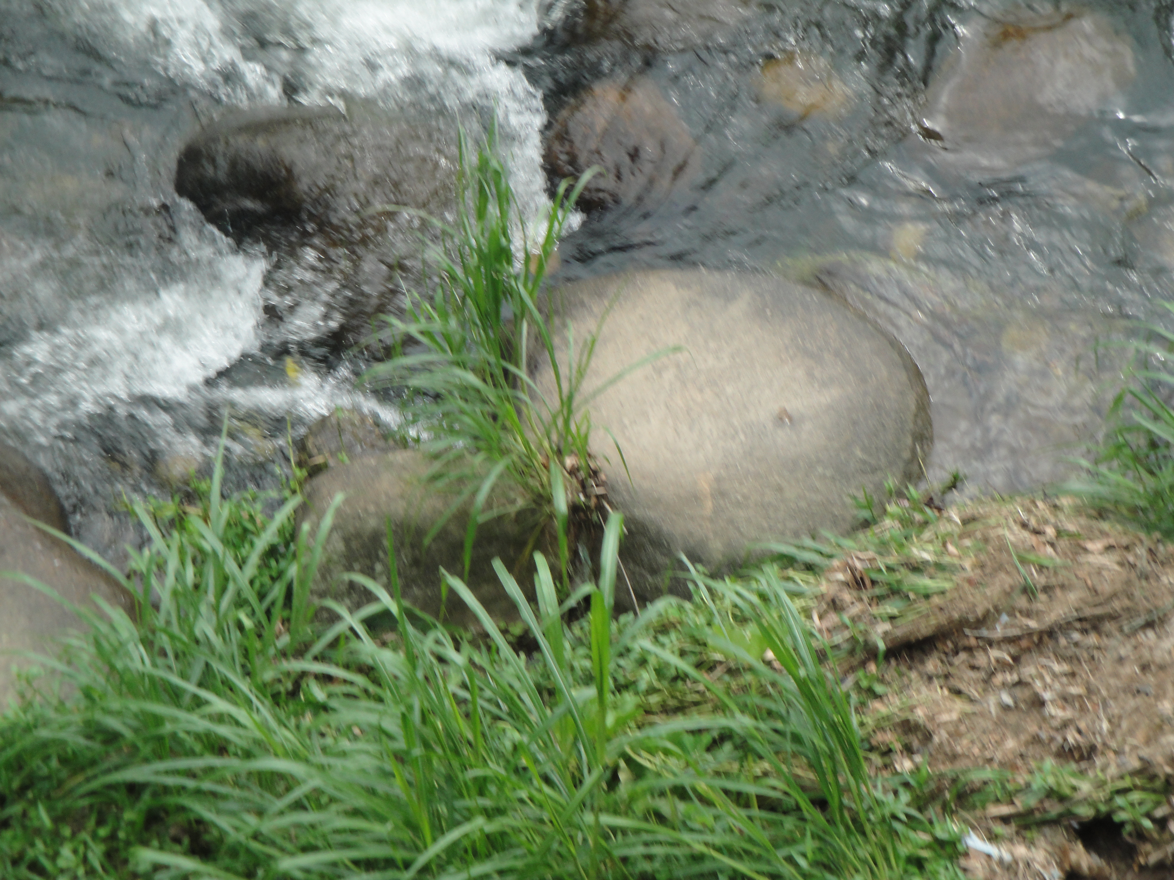 Imagem do Rio Macacu.